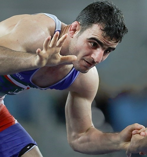 2016 Summer Olympics, Men's Freestyle Wrestling 65 kg